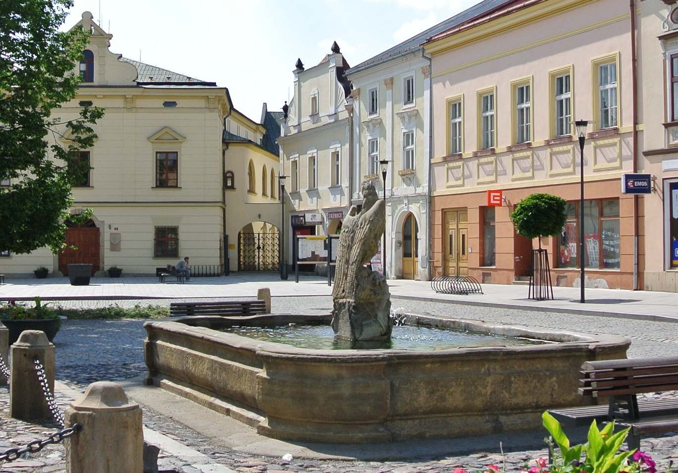 Kašna s orlem, detail